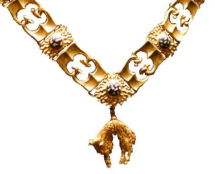 Keten va het Gulden Vlies, witte achtergrond